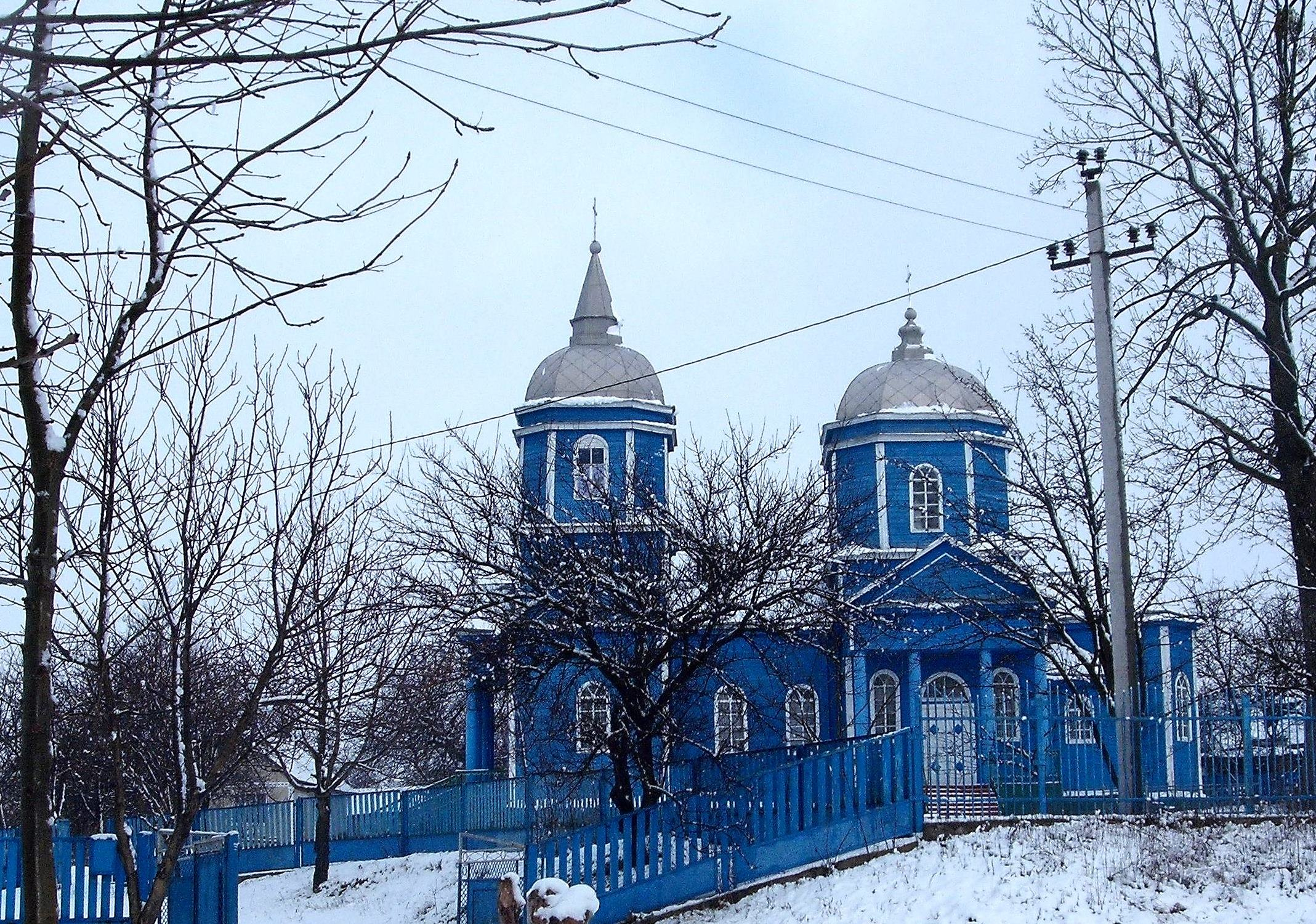 Свято-Покровська церква (УПЦ МП), с. Летичівка. Перша дерев'яна церква була збудована в 1746 році. Через 120 років її перенесли в с.Антоніну, а на її місці була споруджена нинішня. Реставрована у 1980-х роках. пам'ятка сакральної архітектури обласного значення.